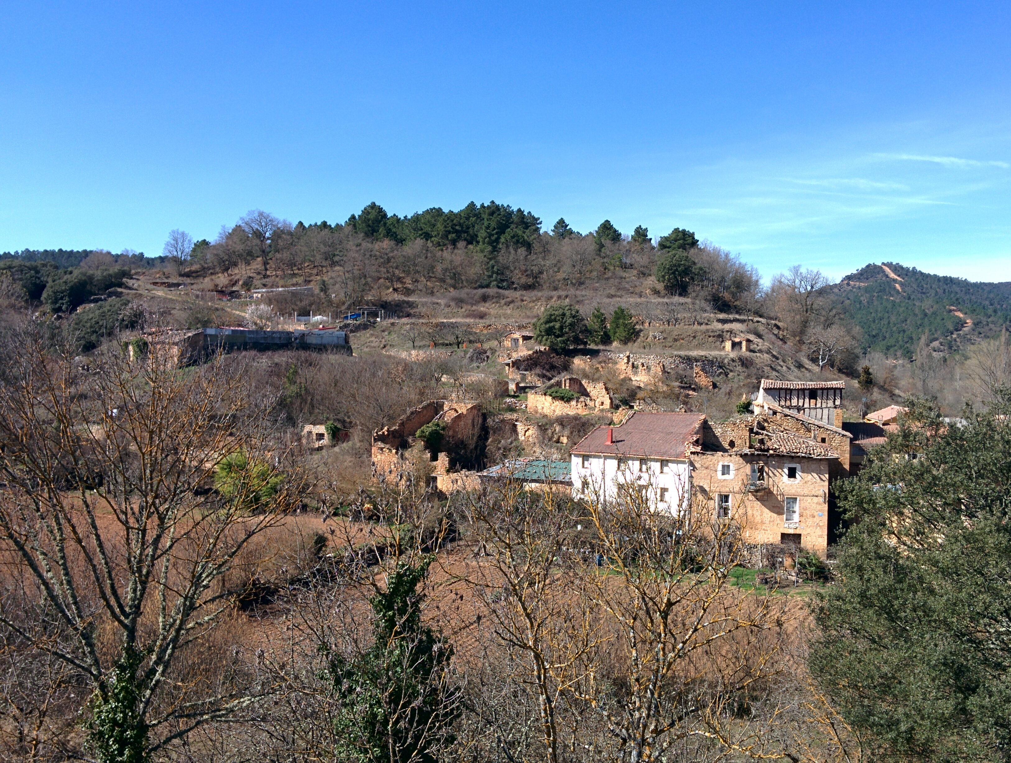 Padrones de Bureba (Burgos, España).